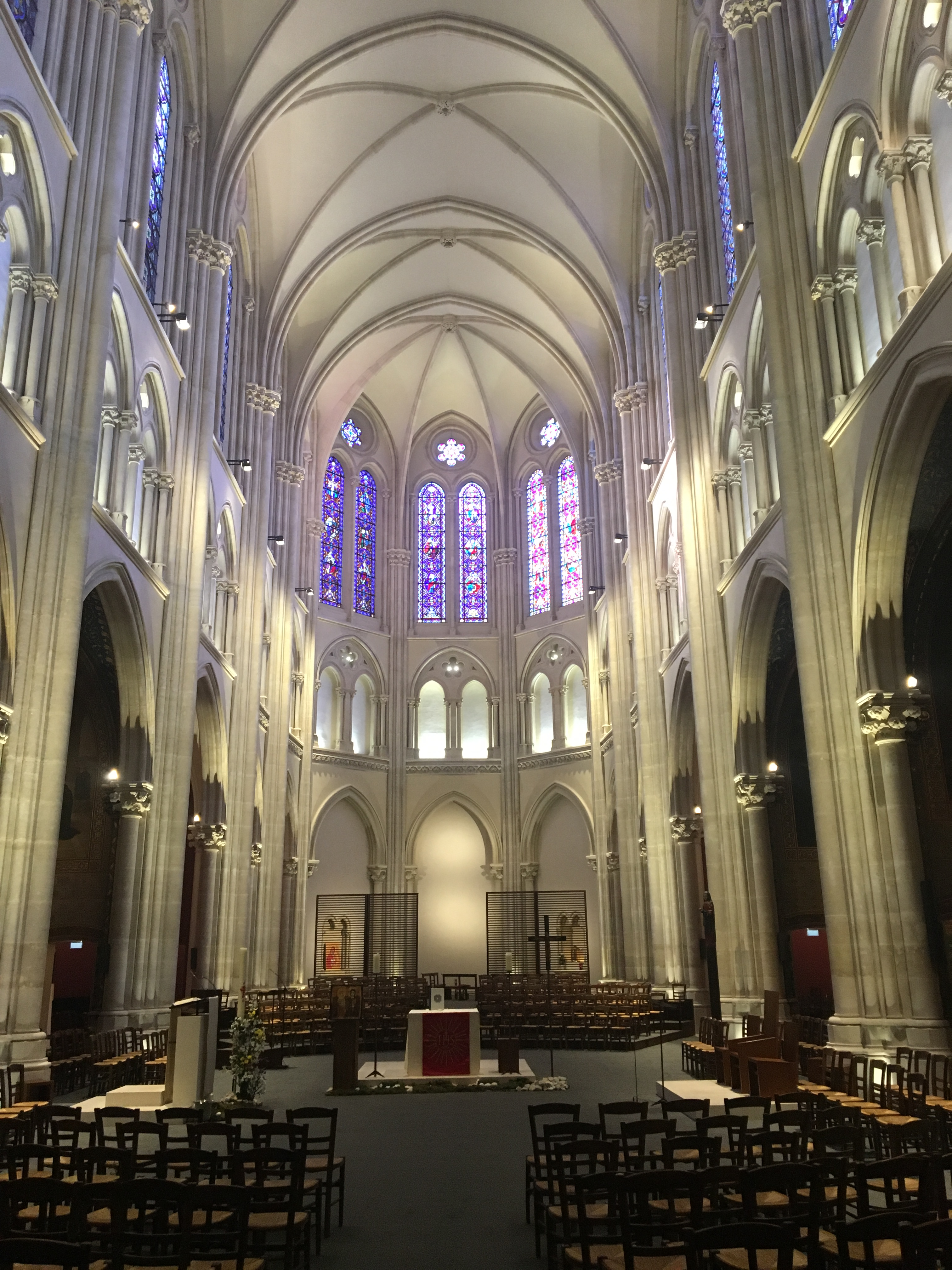 L'église saint-Ignace de Paris, après la renovation de 2017-2018